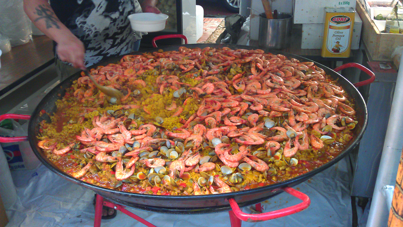 西班牙海鮮燉飯